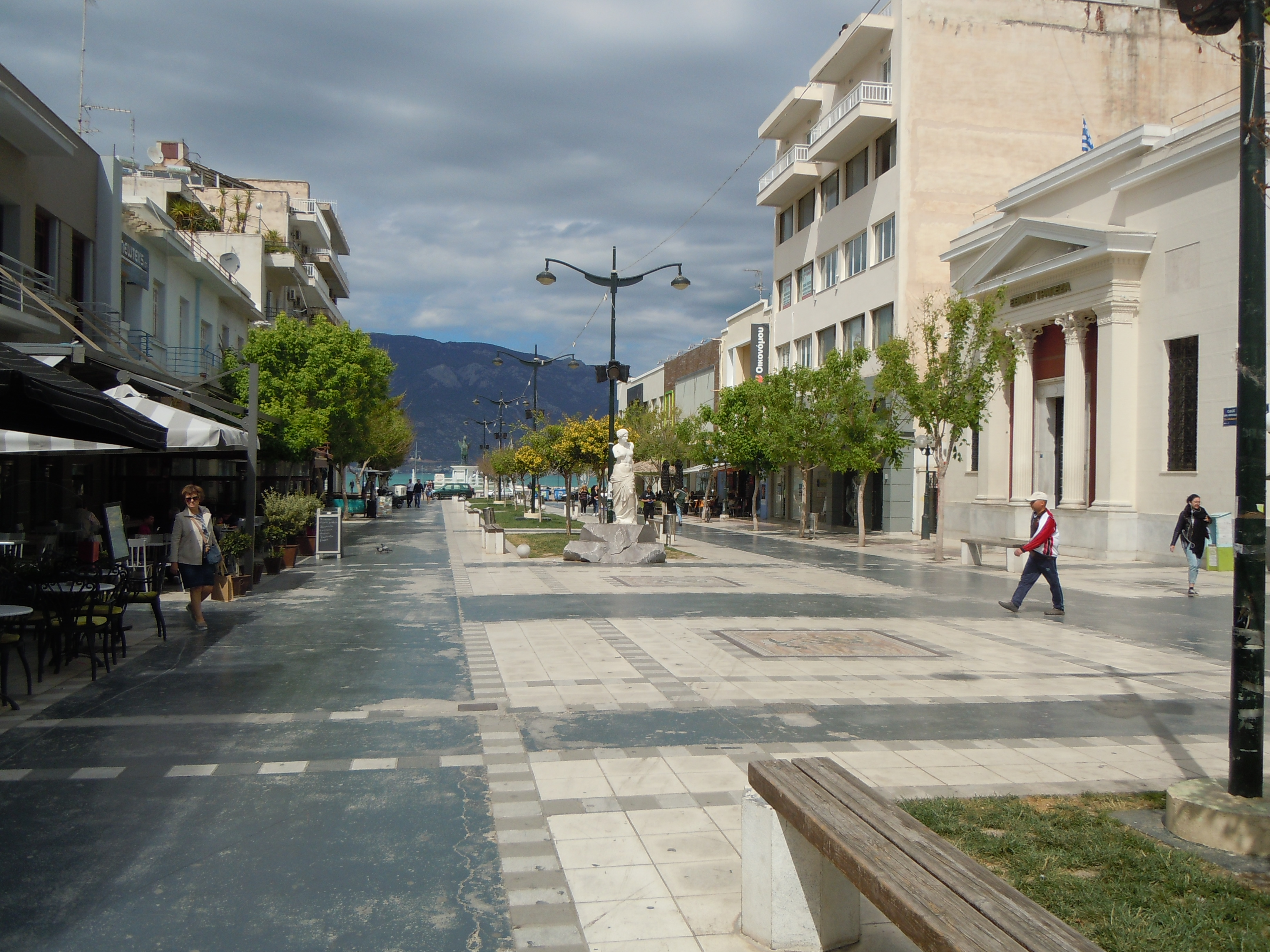 Corinthe, rue piétonne centrale, Odos Ethnikis Antistaseos, reproduction de la Venus de Milo